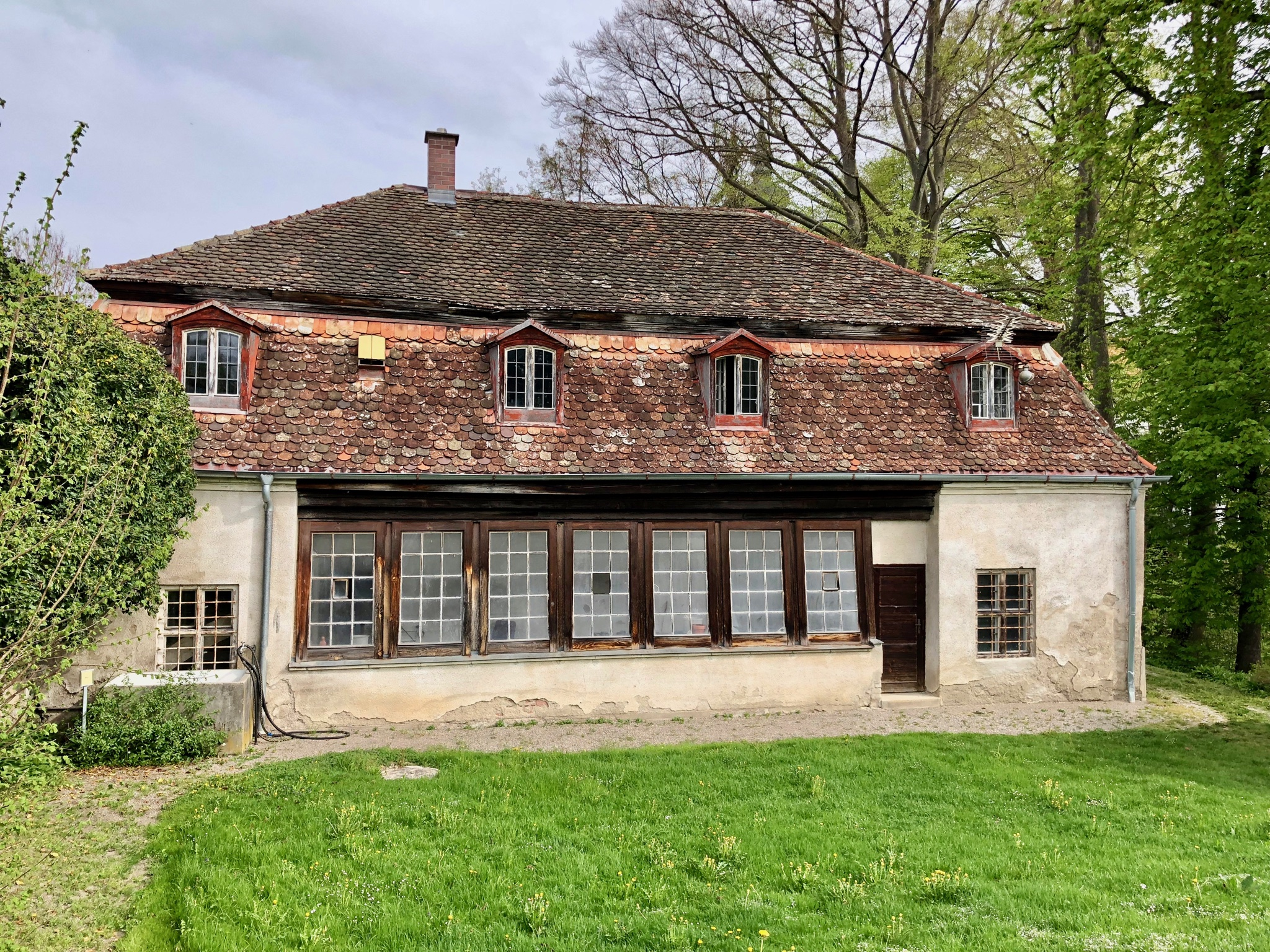 Orangerie des ehemaligen Augustiner-Chorherrenstiftes: eingeschossiger Mansardwalmdachbau mit breiter Fensterfront nach Süden, spätbarock, 2. Hälfte 18. Jahrhundert, über Kern der Mitte des 17. Jahrhunderts